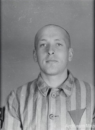 Krzysztof Sobieszczański (pseudonim Kolumb), osadzony nr 9913 (1941-1942) w niemieckim obozie koncentracyjnym Auschwitz w Oświęcimiu (województwo małopolskie).